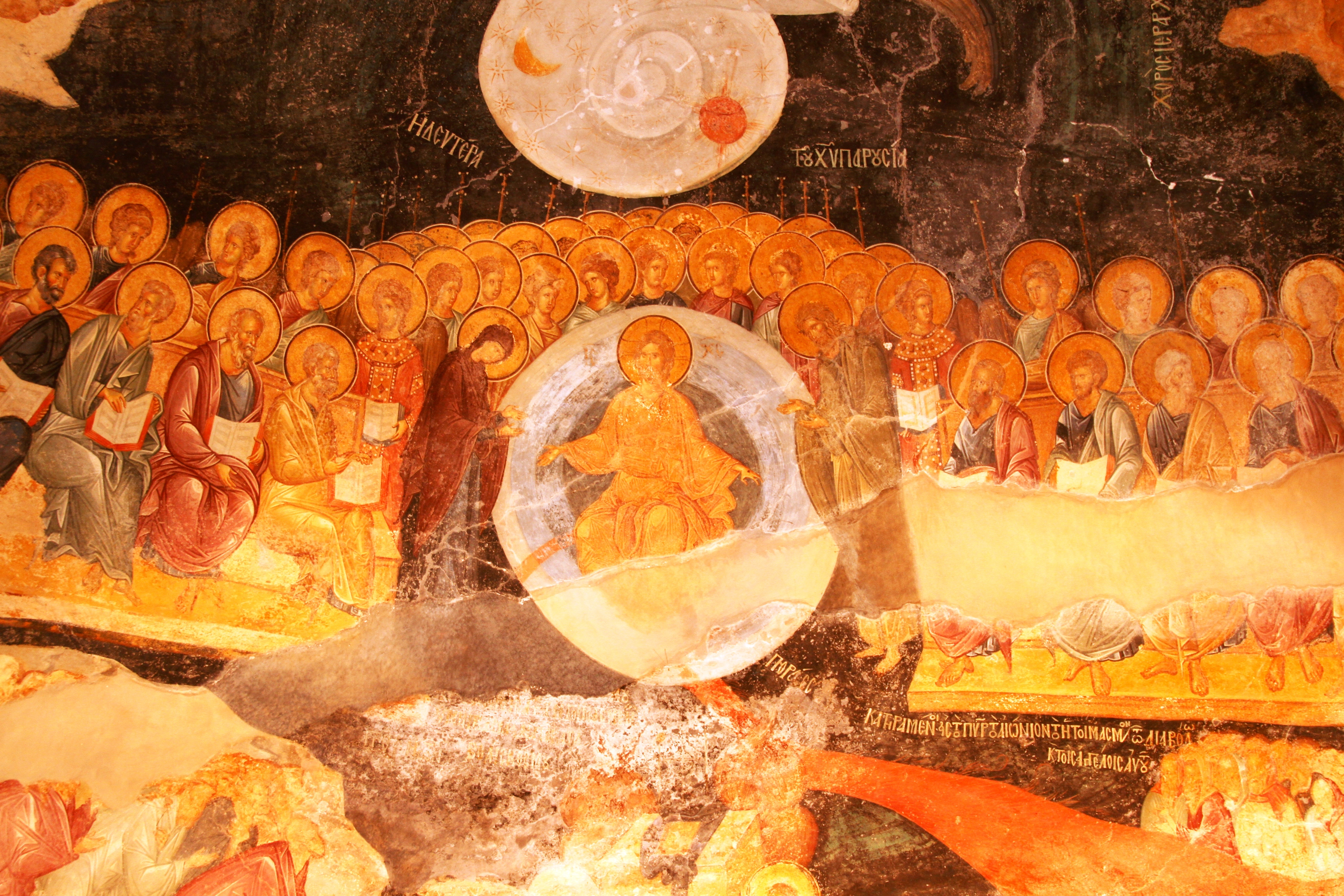 A Deesis ("Súplica") no mosaico do Juízo Final em Chora